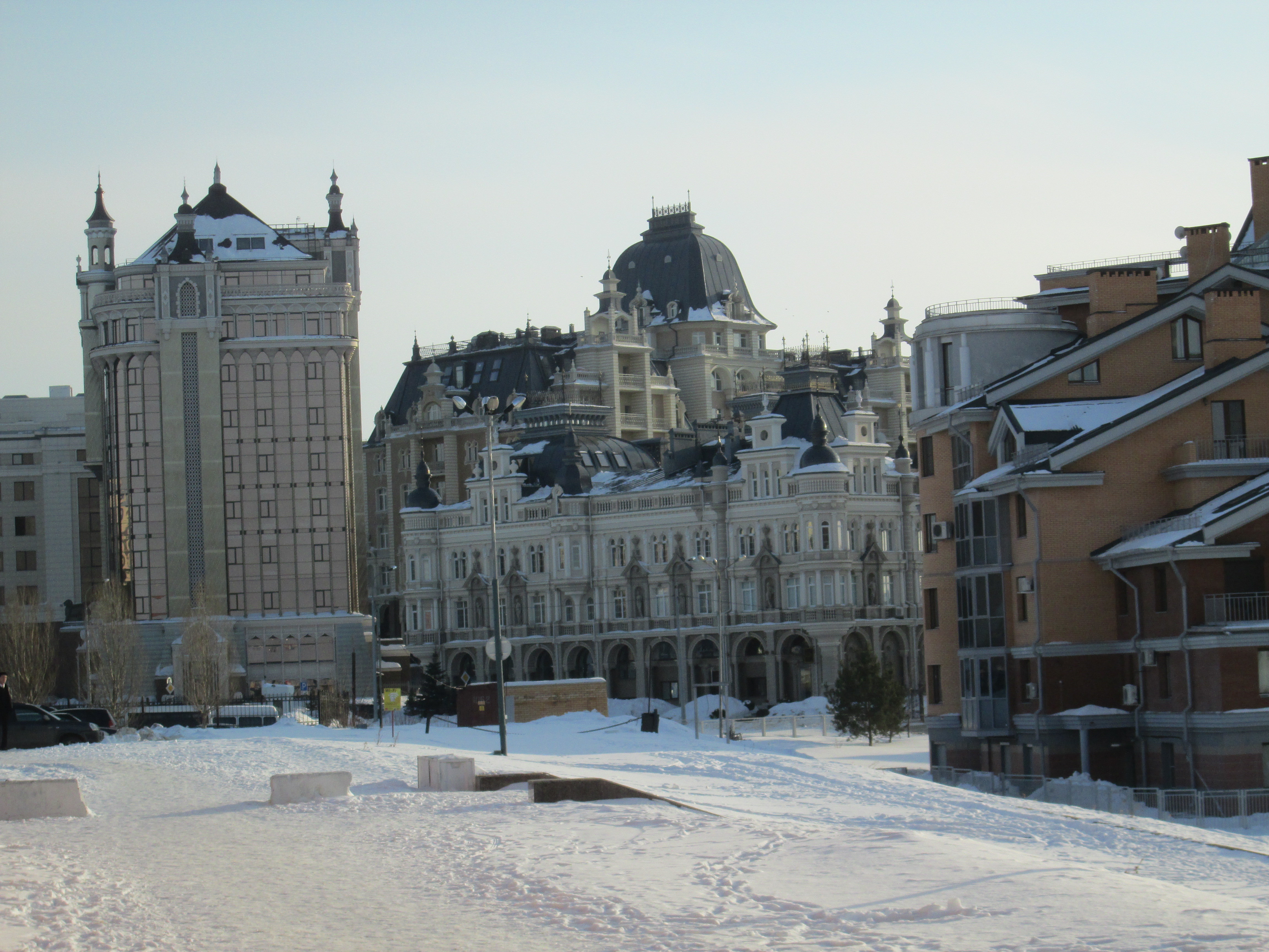 дом № 15 по улицы касаткина в казани и дом ренесанс. март 2013